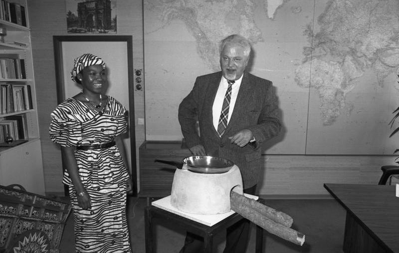 11.8.1987 Parteistaatssekretär Volkmar Köhler überreicht der Botschafterin von Burkina Faso, Marie Savadogo, einen brennstoffsparenden Lehmherd, ein Produkt deutscher Entwicklungshilfe, von dem bereits 300.000 in Burkina Faso von der Bevölkerung selbst gebaut und in Betrieb genommen wurden - im Bundesministerium für wirtschaftliche Zusammenarbeit und Entwicklung.